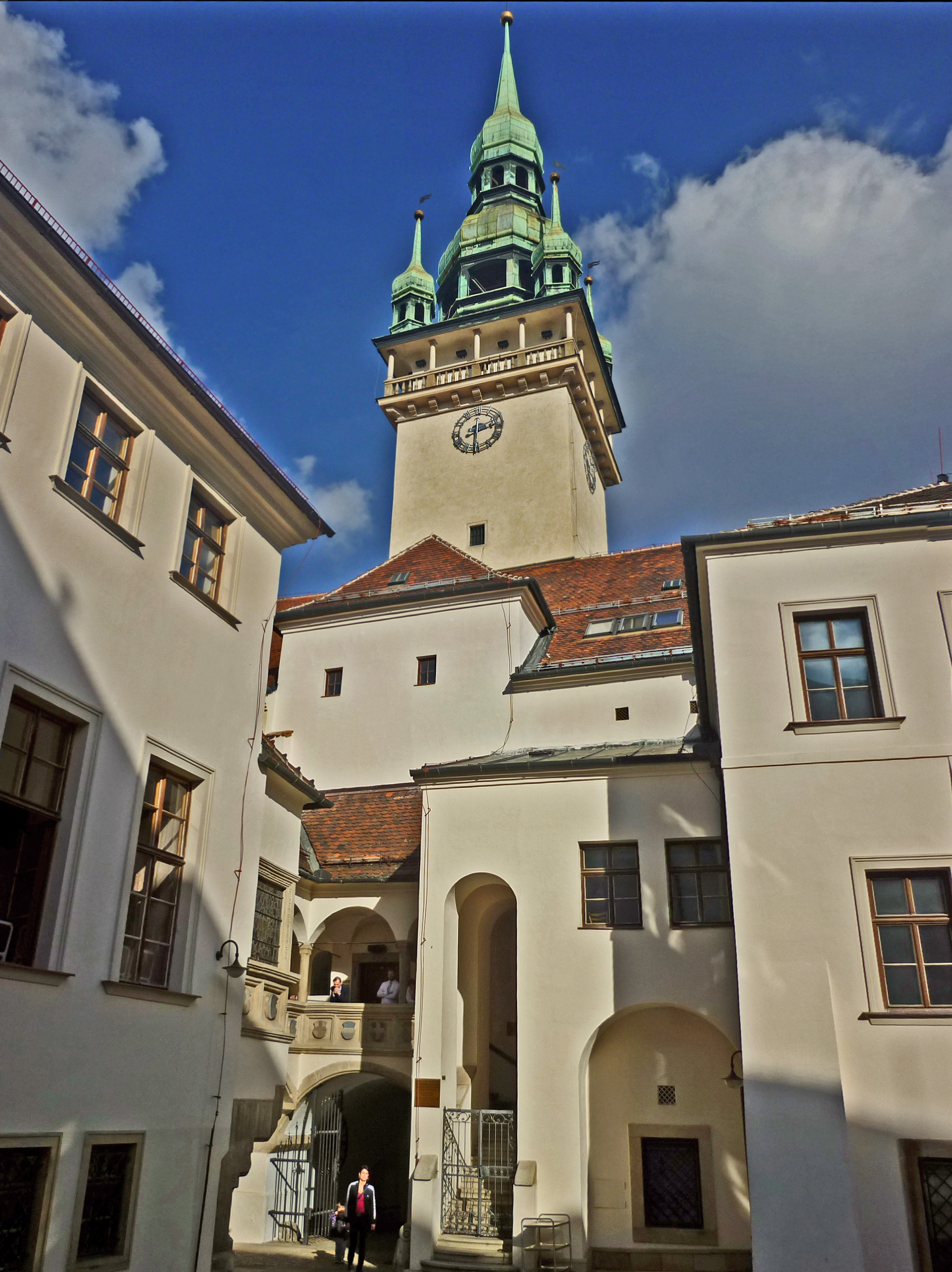 Altes Rathaus in Brünn (Brno), Innenhof